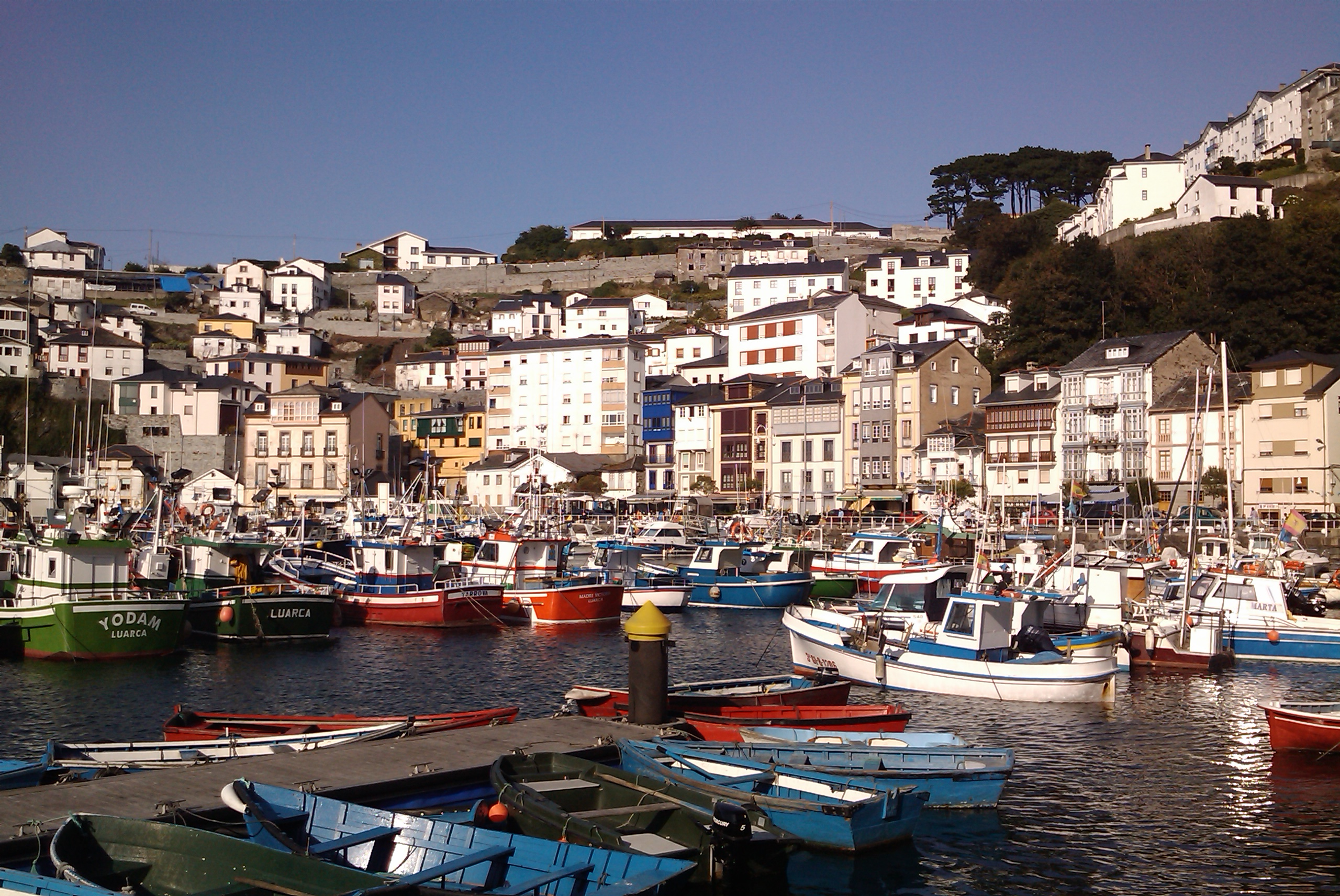 Ya nos quedan pocos días en Asturias. En dos días entramos en Galicia. Intentaremos aprovecharlos. En la foto vemos el puerto de Luarca.